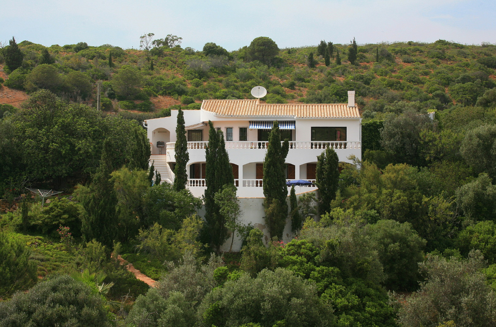 Salema Portugal February 2015